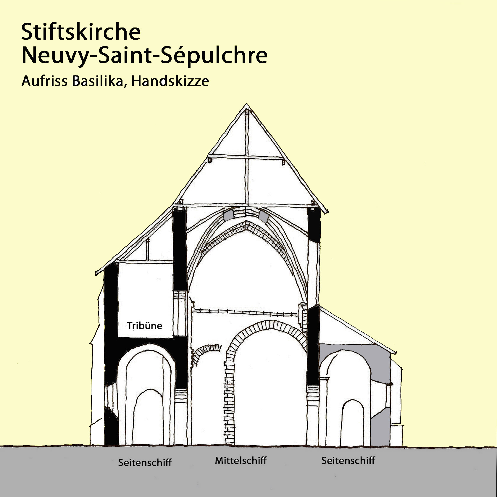 Stiftskirche_Neuvy-St.-Sépulchre, Aufriss_Basilika,Handskizze